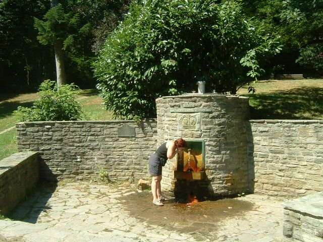 öffentlich zugängige Heilquelle, Mineralquelle in Kronberg am Taunus bei den Kronthaler Quellen.